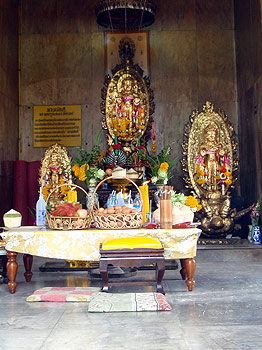 พระพนัสบดี